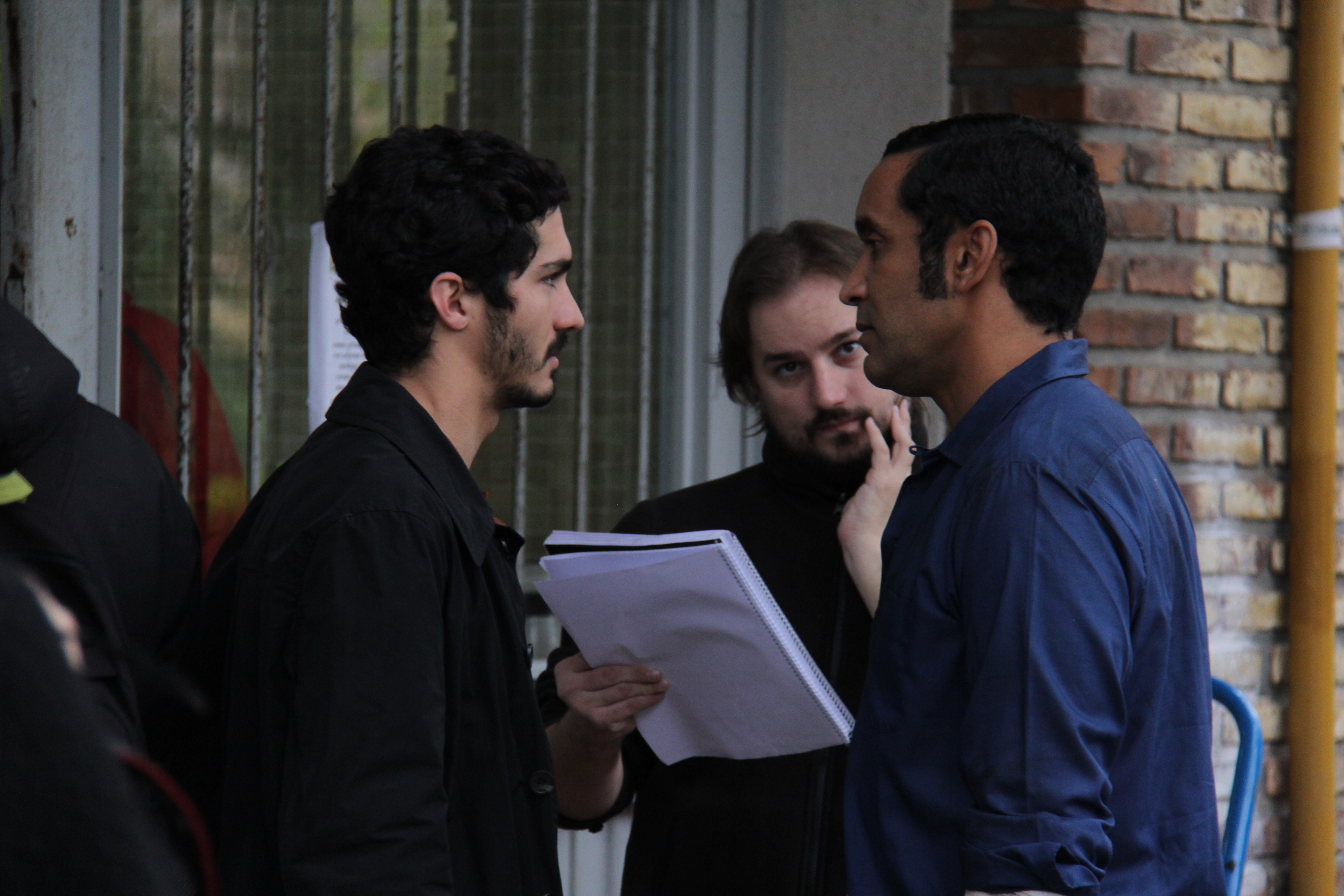 Corsini dirigiendo Pasaje de Vida con Chino Darín y Diego Alonso